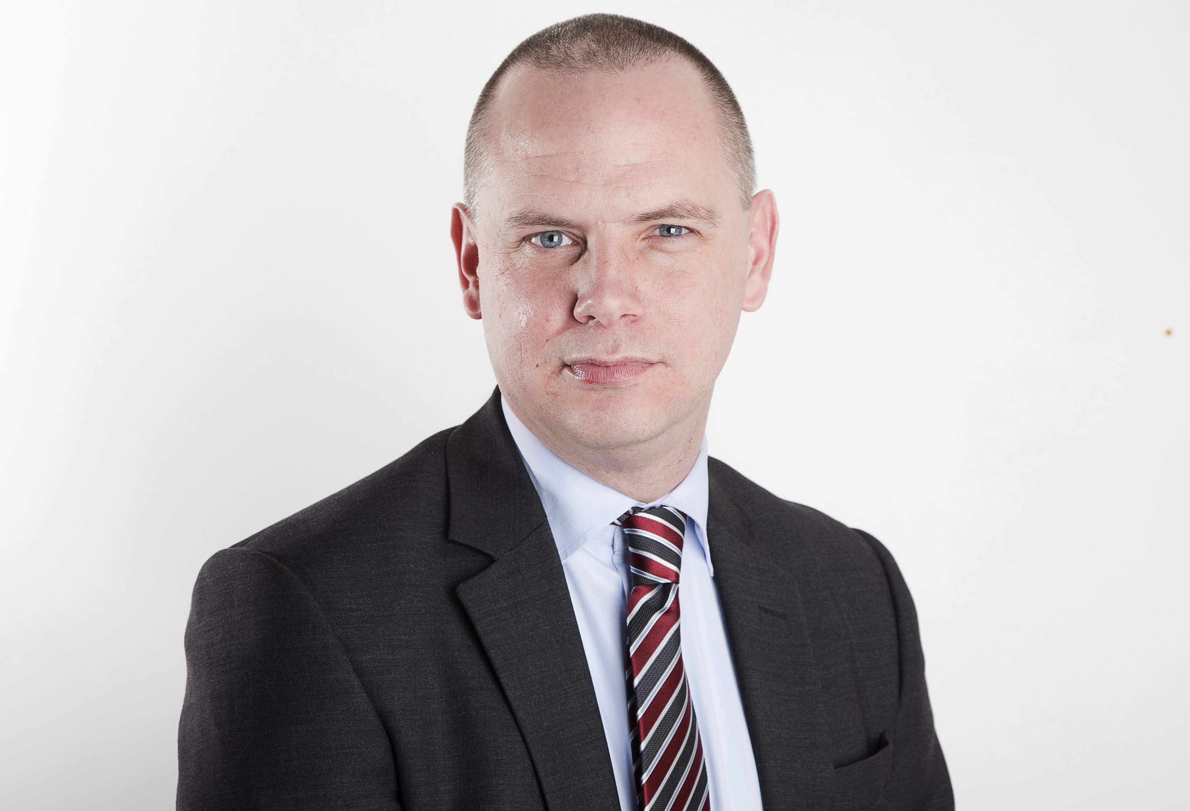 Urban Granström pressbild Nyköpings Kommun